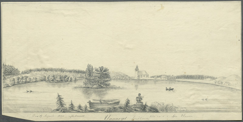 Sjön Unnen och kyrkan från söder. I bildens mitt nertill avbildar konstnären sig själv på en ö i sjön. Blyertsteckning från den 19 augusti 1840. Motiv: Södra Unnaryds kyrka Kategori: Insjömiljöer, Teckning Sjön Unnen och kyrkan från söder. I bildens mitt nertill avbildar konstnären sig själv på en ö i sjön. Blyertsteckning från den 19 augusti 1840.